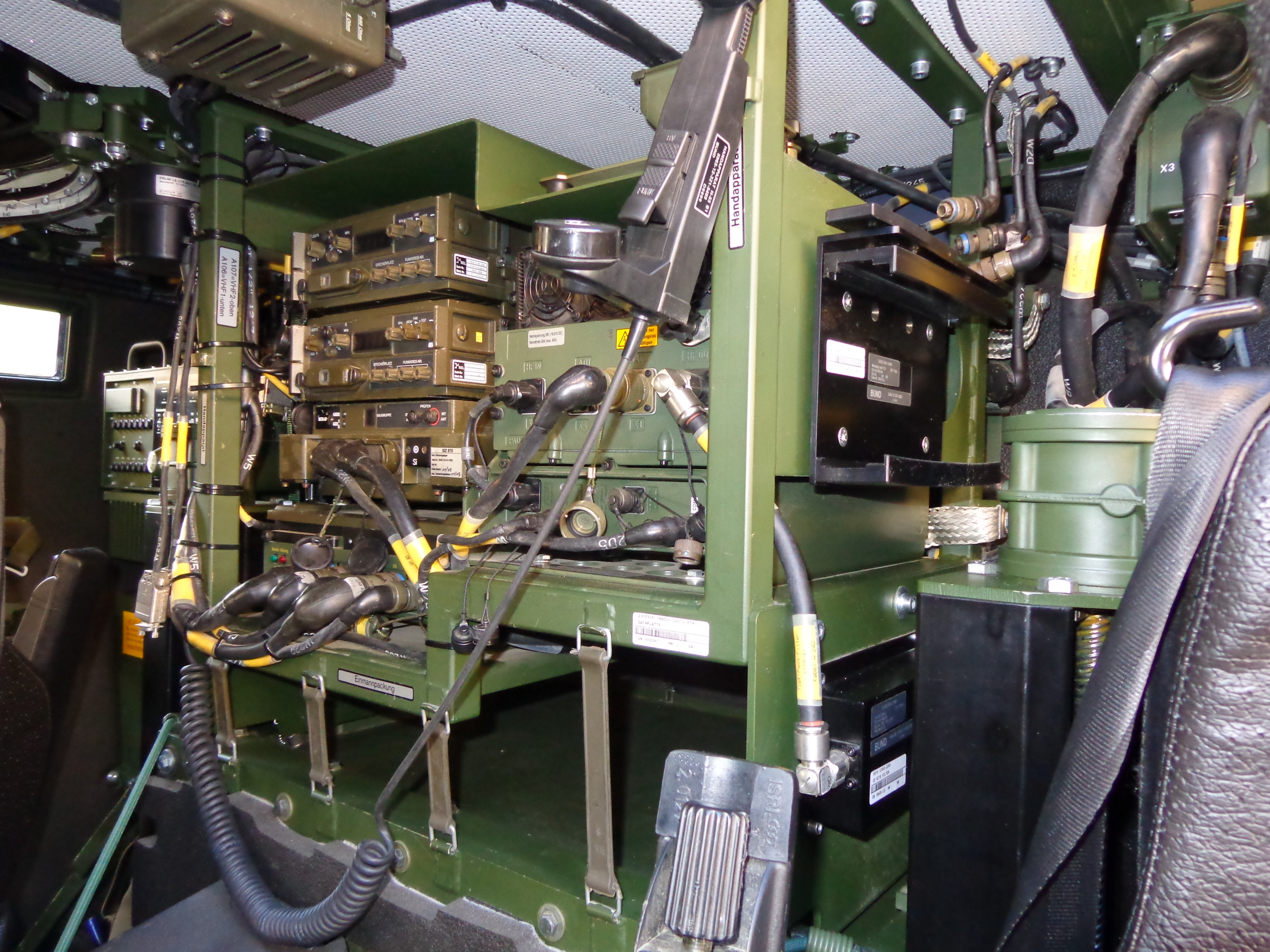 Die Funkanlage im Spähwagen Fennek der Bundeswehr.